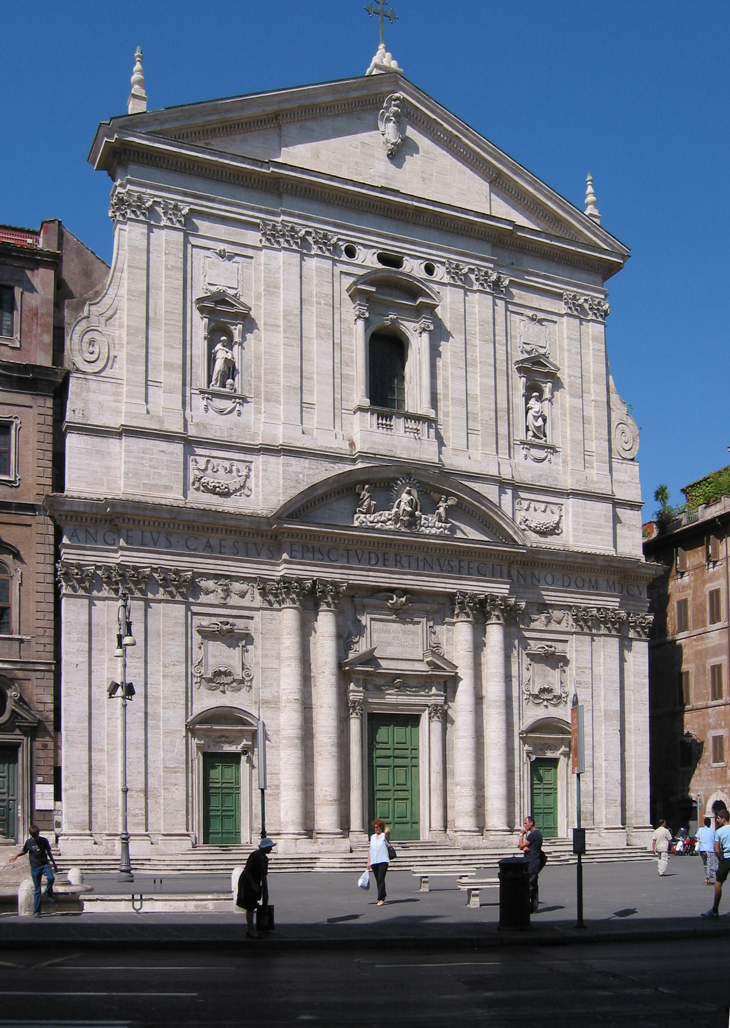 Roma, S. Maria in Vallicella (Chiesa Nuova), Facciata